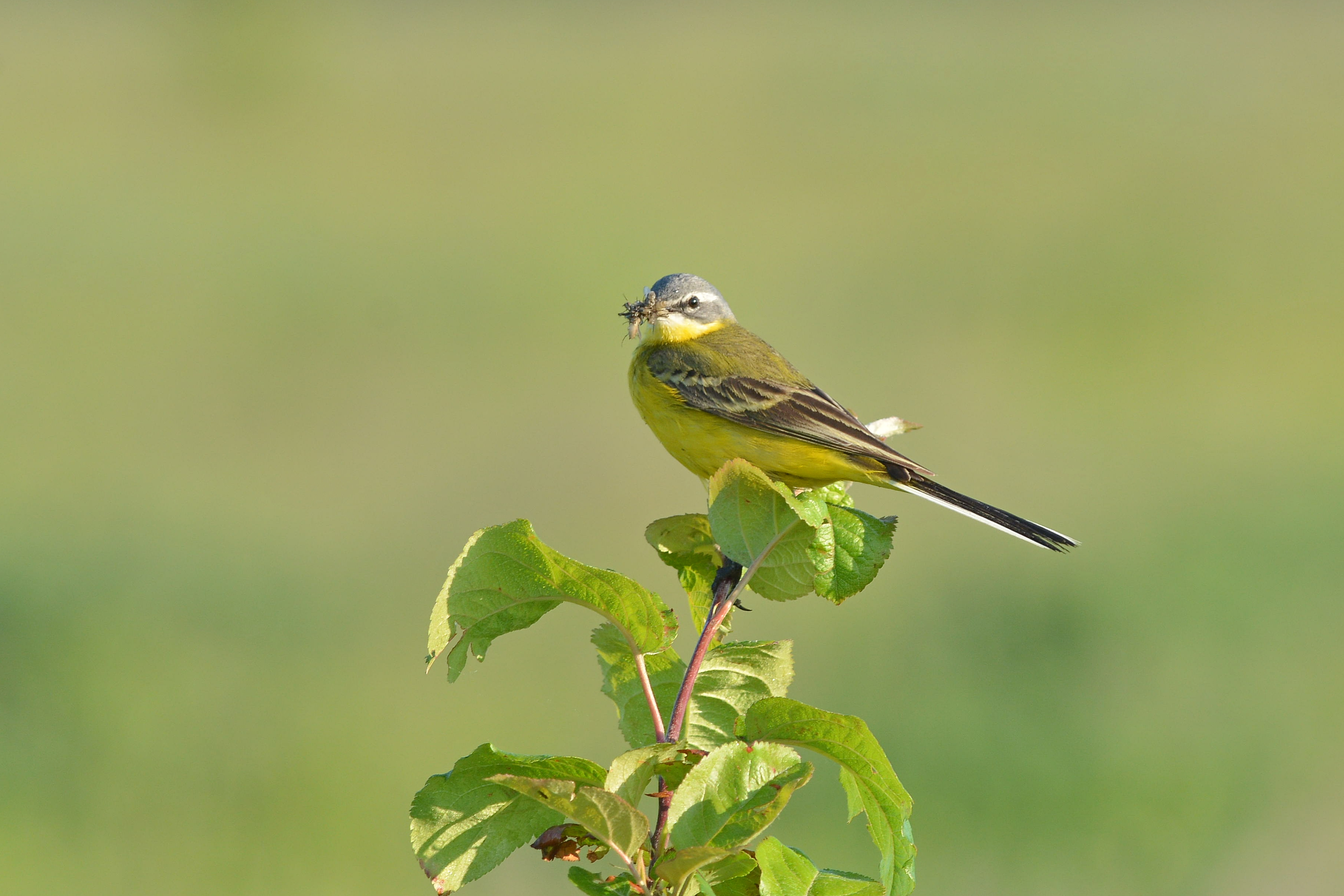 Фоновий вид орнітофауни відкритих ландшафтів Лісостепу України